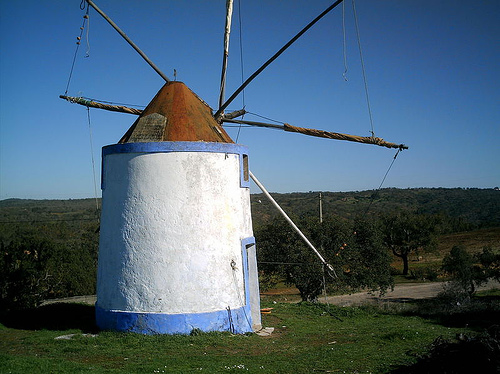 Miróbriga Santiago do Cacém